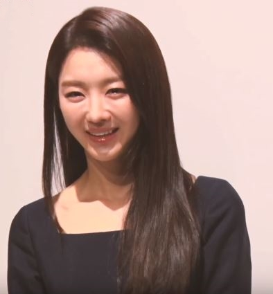 12일 오후 서울 JW 메리어트 호텔에서 한 코스메틱 브랜드의 국내 론칭 기념 행사가 열렸다.